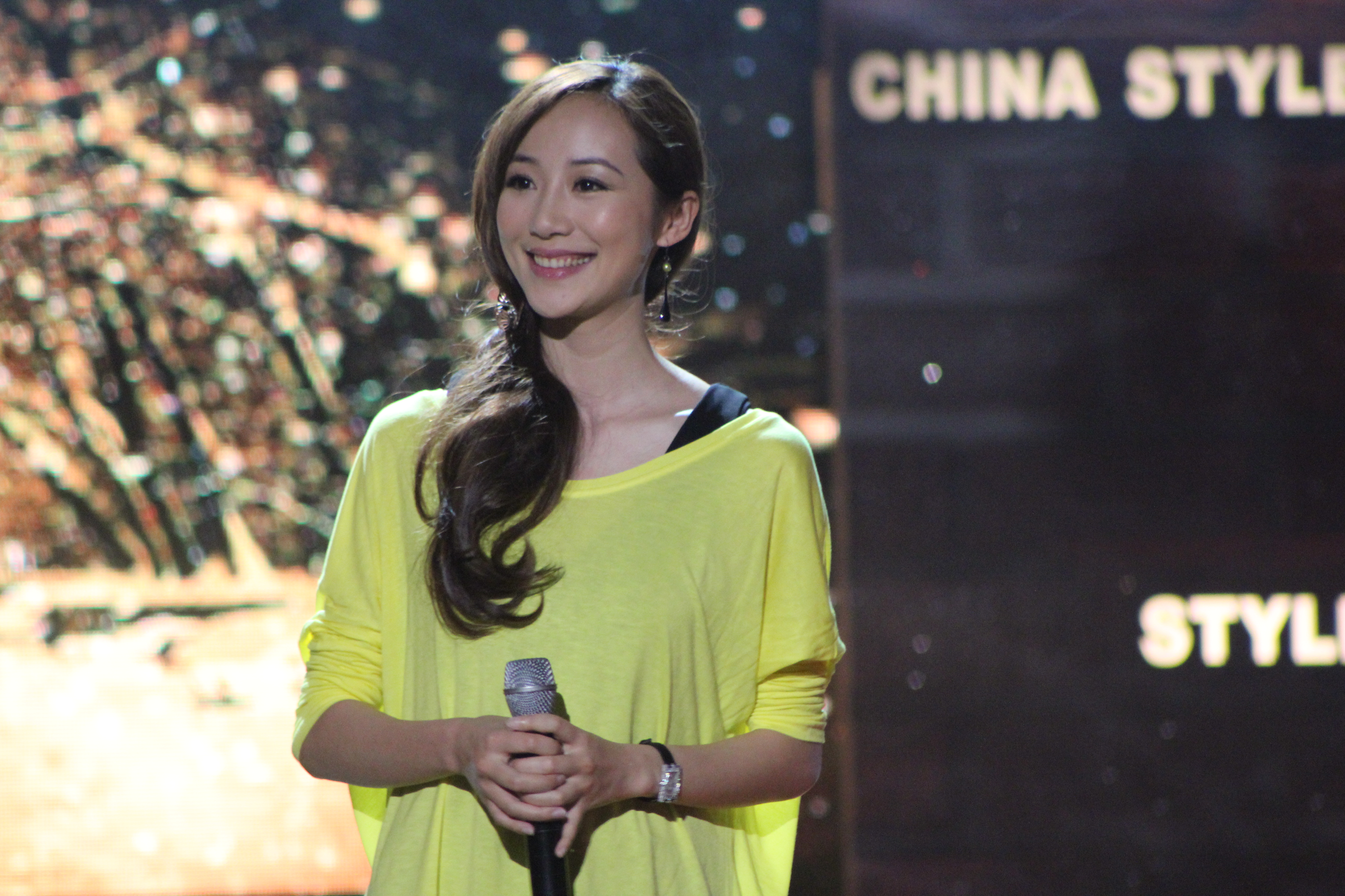 上海录制湖北卫视节目《中国范儿》